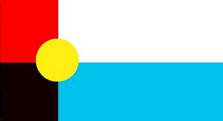 Bandera de Pinto (Santiago del Estero, Argentina).